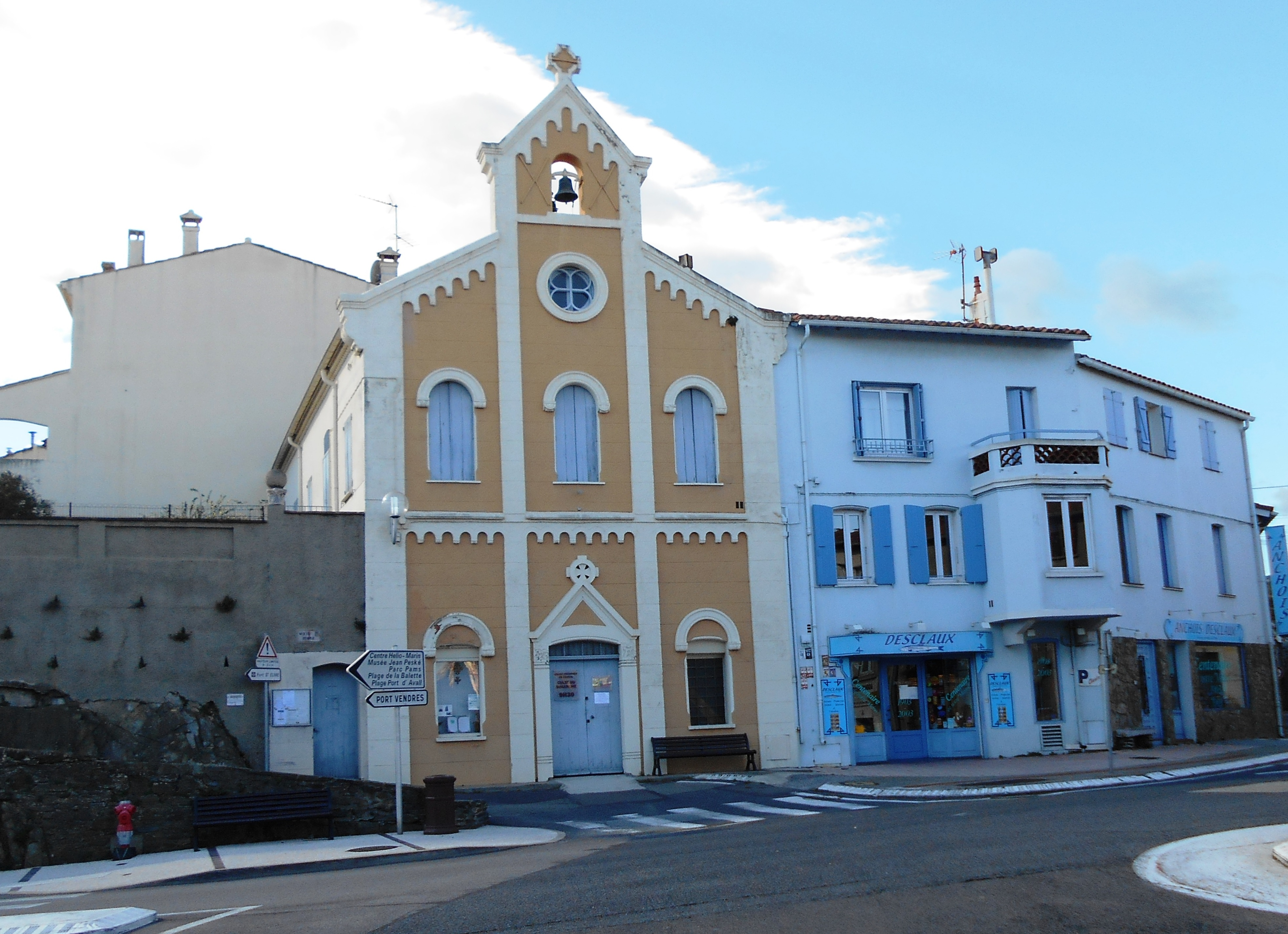 Temple de l'Església Protestant Unida de França